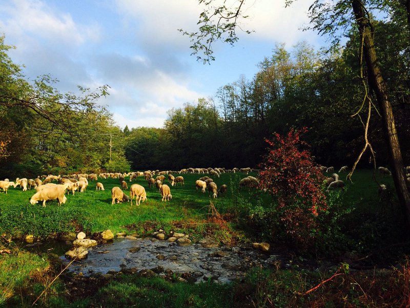 Parco del Lura. Valle del Torrente Livescia in Comune di Cassina Rizzardi.